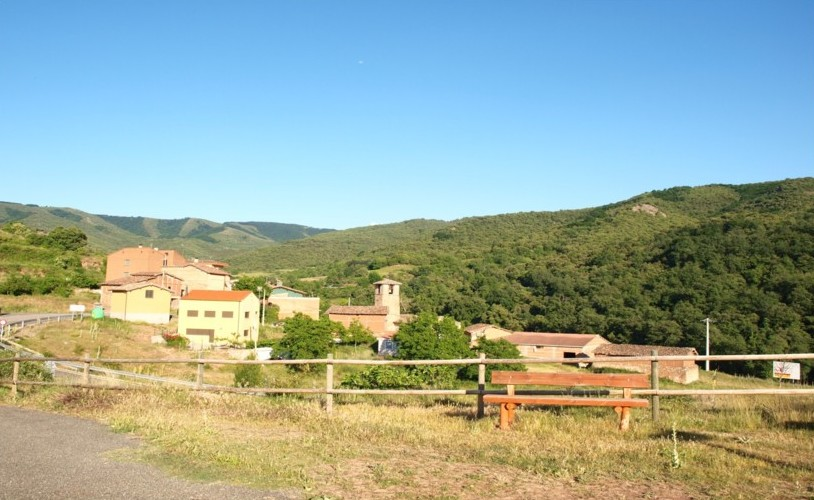 Vista parcial de Ledesma de la Cogolla